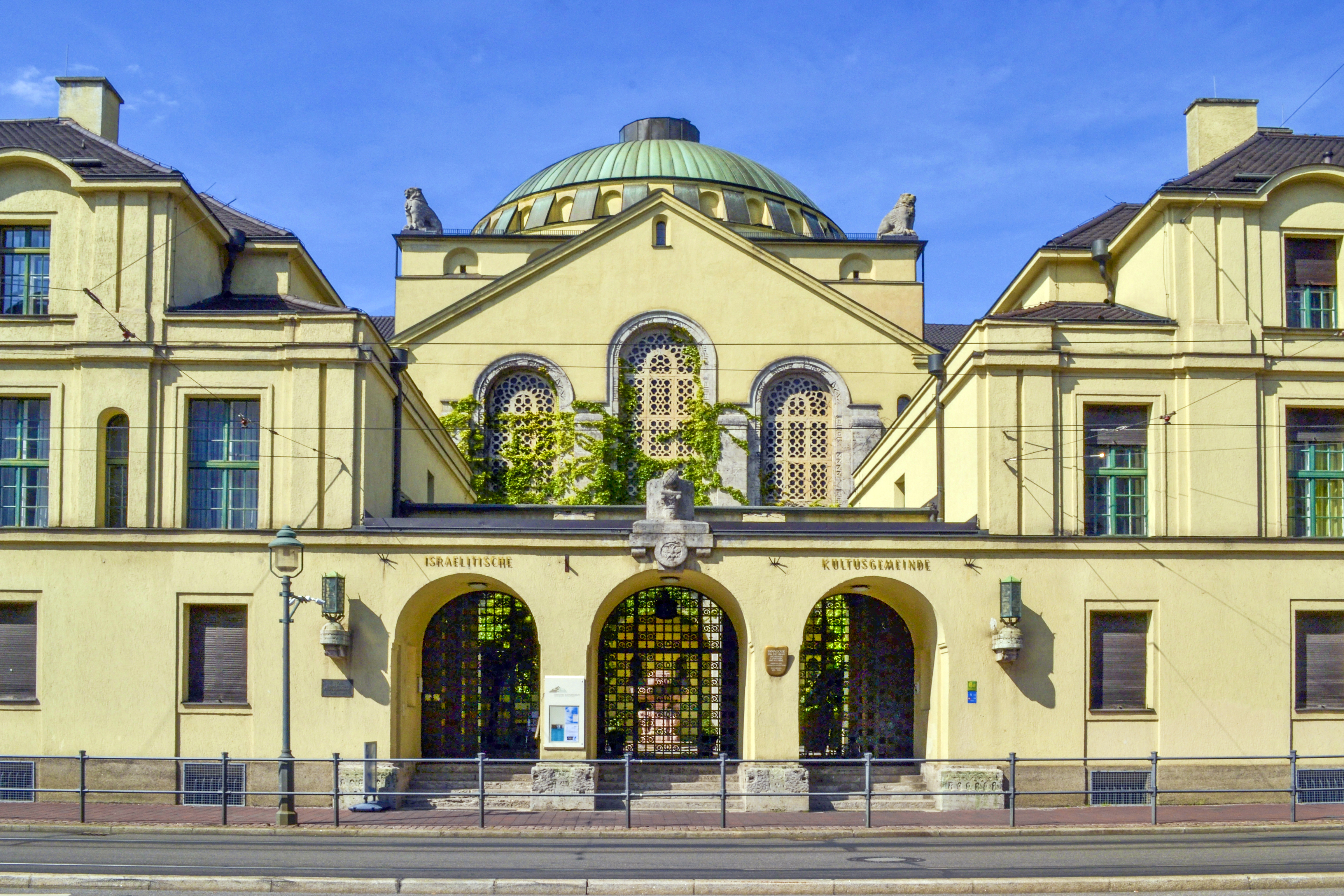 Synagoge in der Halderstraße Augsburg.